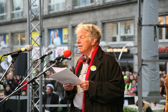 Peter Conradi. Die Fraktion DIE LINKE. im Bundestag lädt zur Kulturkonferenz in die Stuttgarter Wagenhallen und zur Teilnahme an der Demonstration gegen das Bahnprojekt Stuttgart 21.